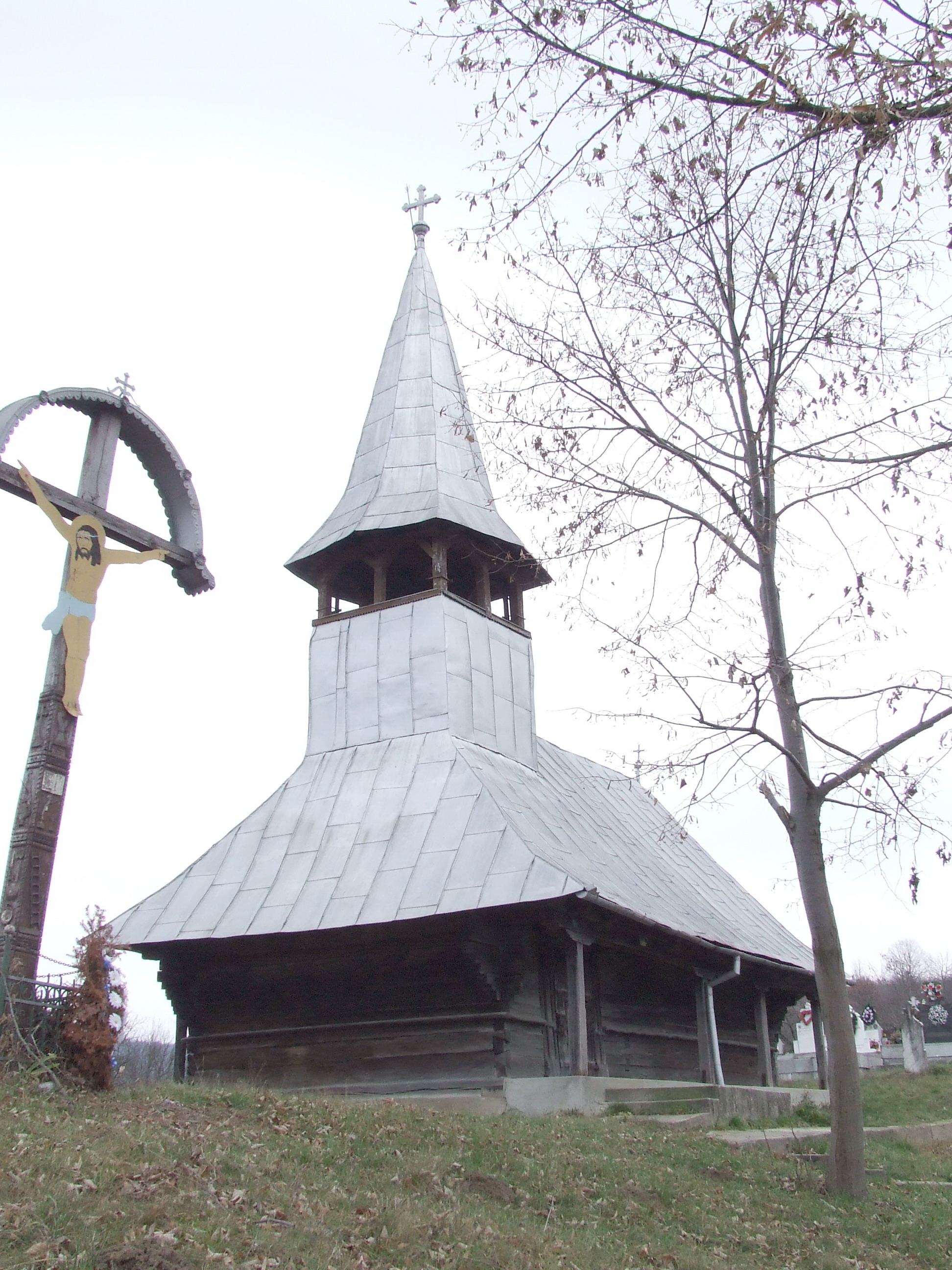 Biserica de lemn din Lugaşu de Sus, judeţul Bihor.